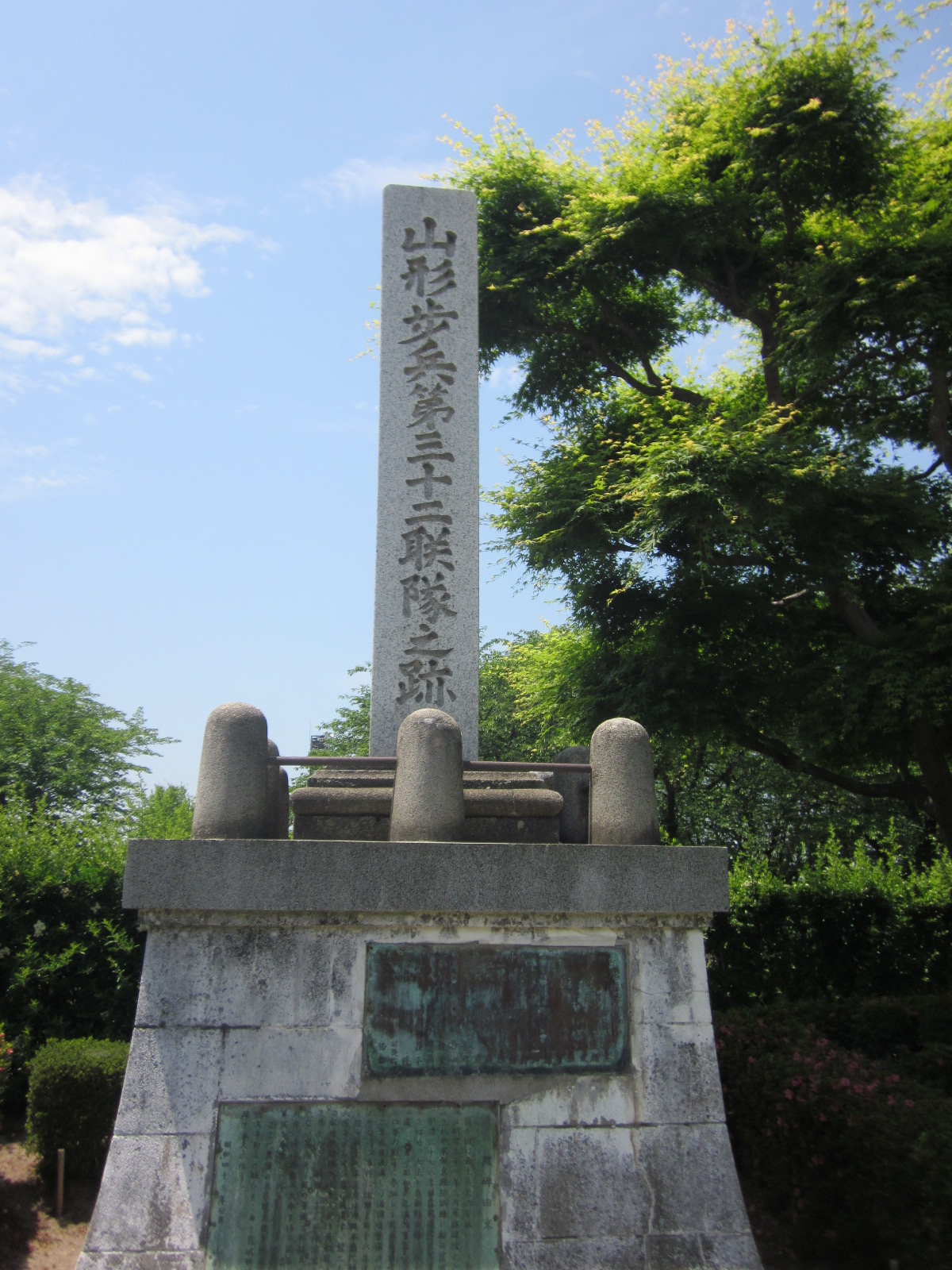 霞城公園、大日本帝国陸軍歩兵第32聯隊之碑。